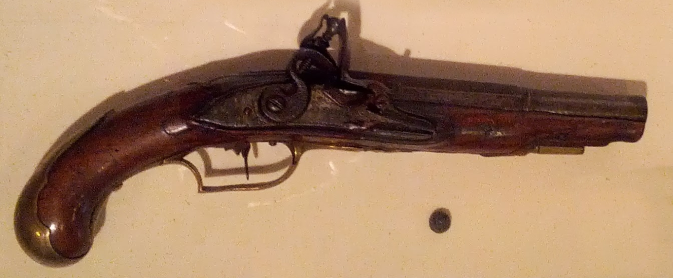 Pistolen blev angiveligt anvendt til at skyde den svenske kommandant Johan Printzenskiöld 8.december 1658, da bornholmerne gjorde oprør, befriede øen og gav den tilbage til den danske konge. Pistolen, der stammer fra oprøreren Jens Kofoeds gård i Østermarie, er dog lavet i 1746 af en pistolmager i Småland, og derfor ikke være anvendt. Genstanden kan ses på Bornholms Museum.